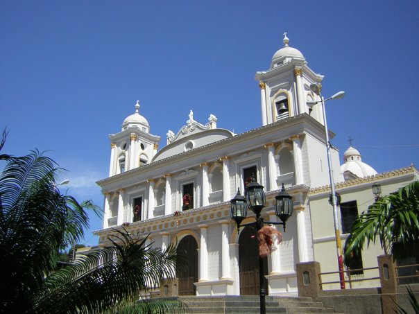 Iglesia principal del pueblo de San casimiro, Venezuela, estado Aragua.